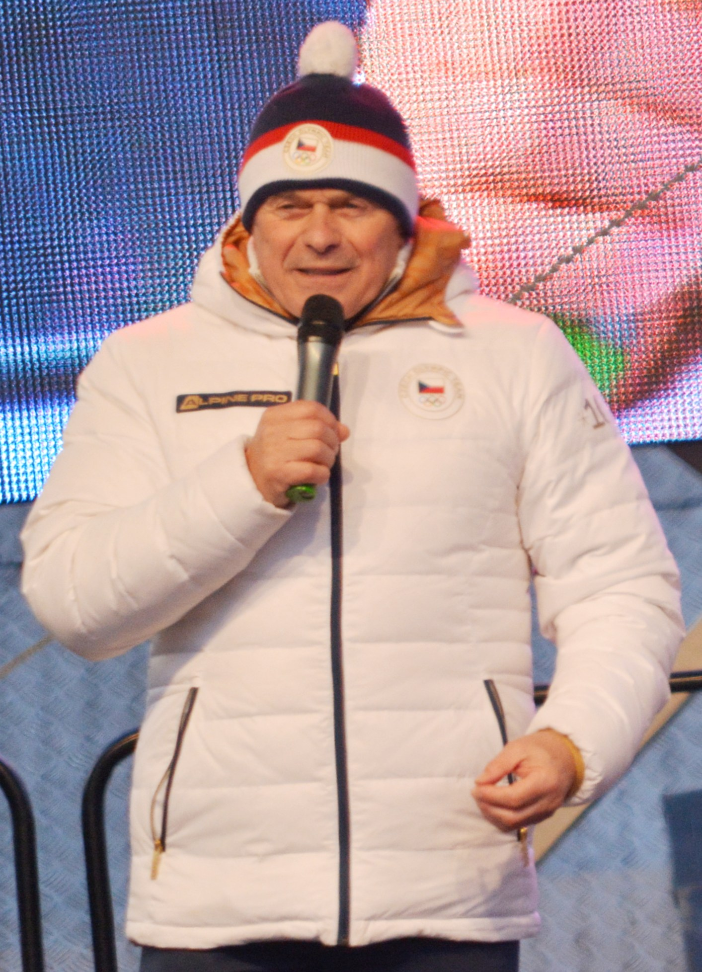 Petr Novák, bývalý československý rychlobruslař a trenér rychlobruslařského NOVIS Teamu